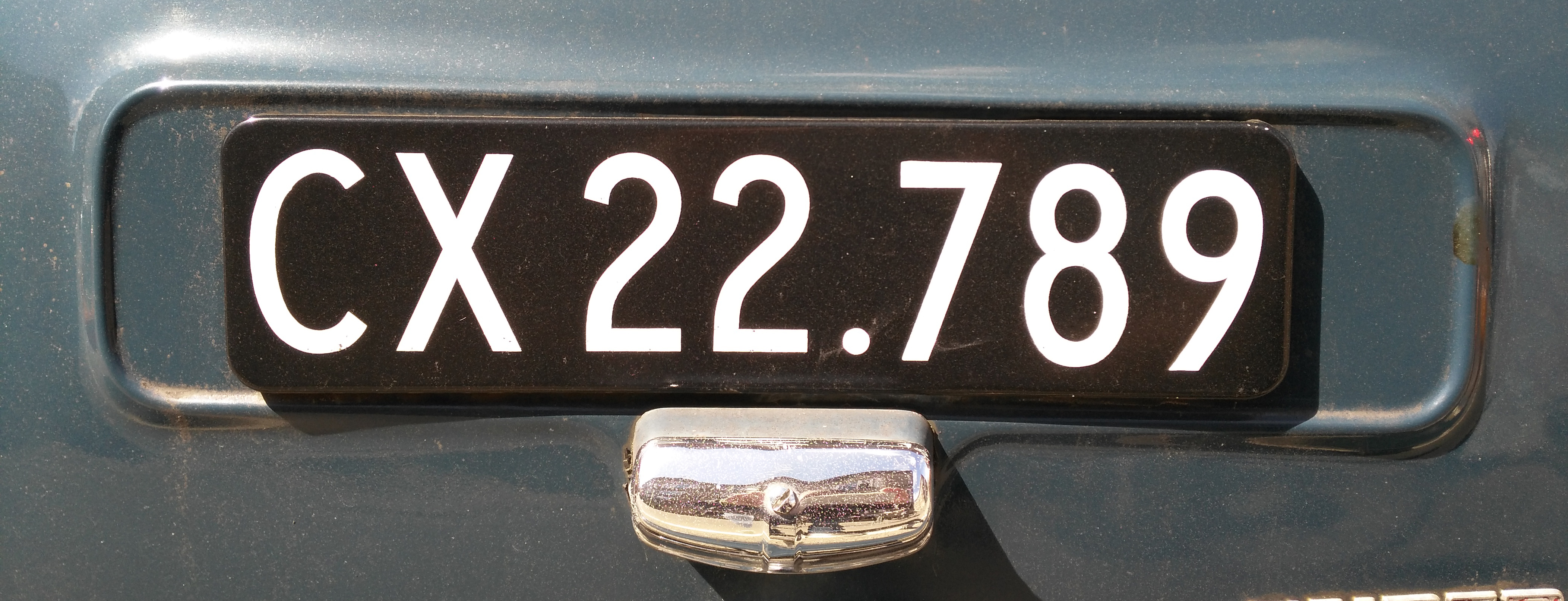 Matrícula danesa antiga.